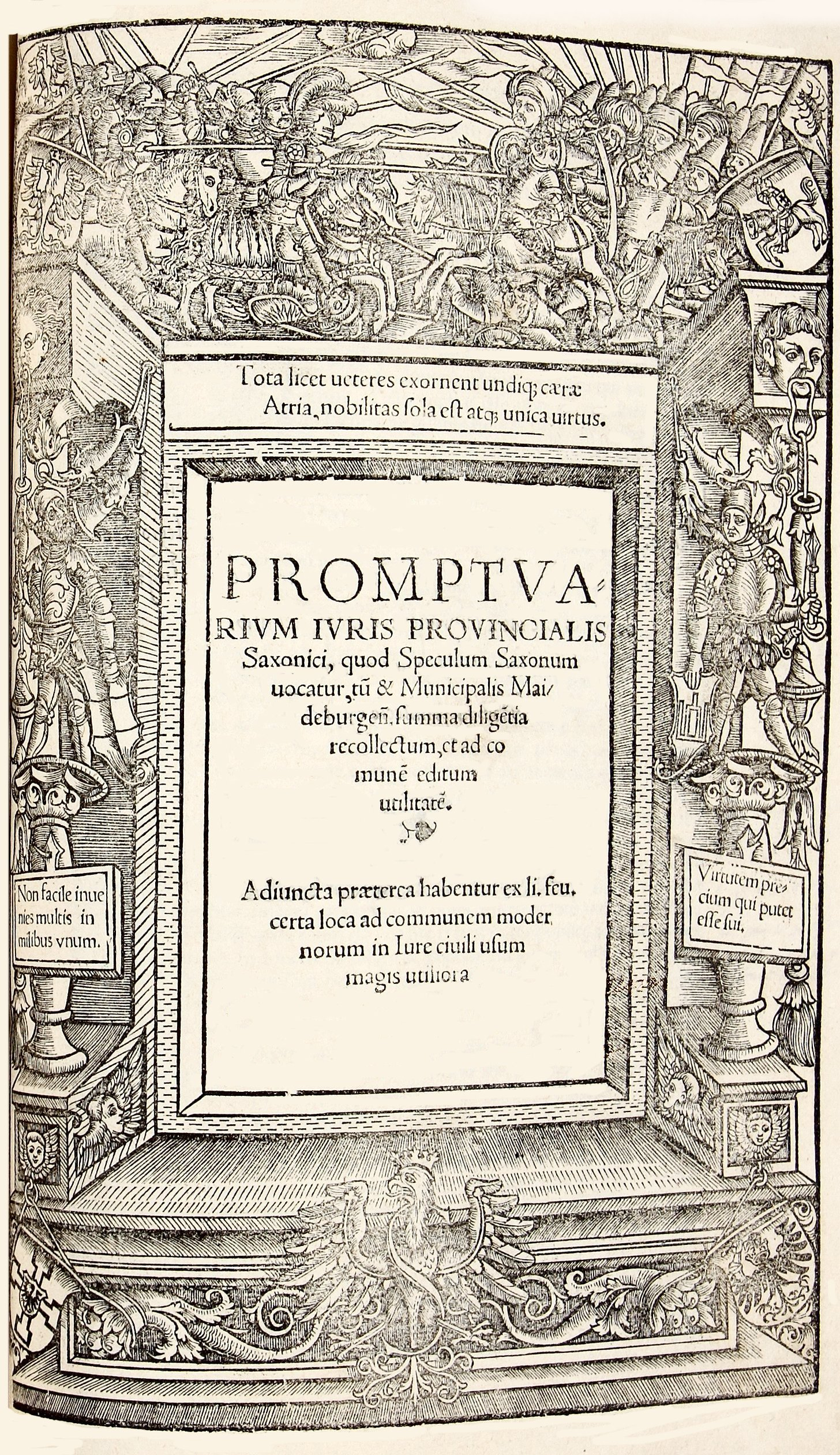 Strona tytułowa Promptuarium Juris Provincialis Saxonici Mikołaja Jaskiera